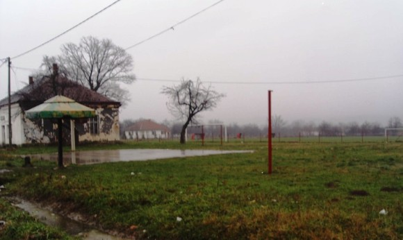 Тврдојевац.